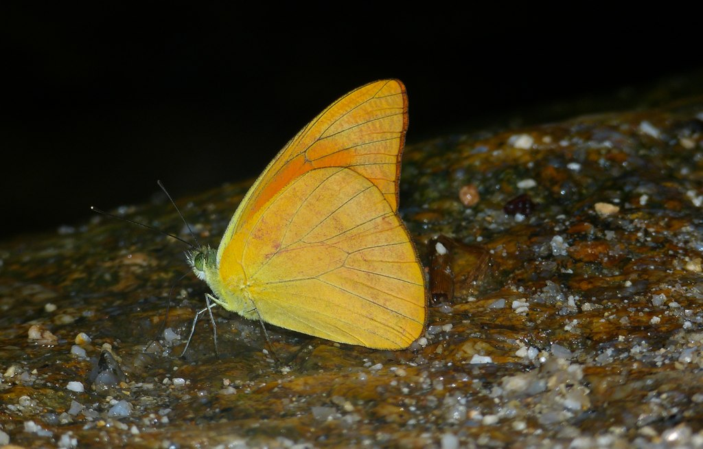 Tapah Hills, Perak, MALAYSIA